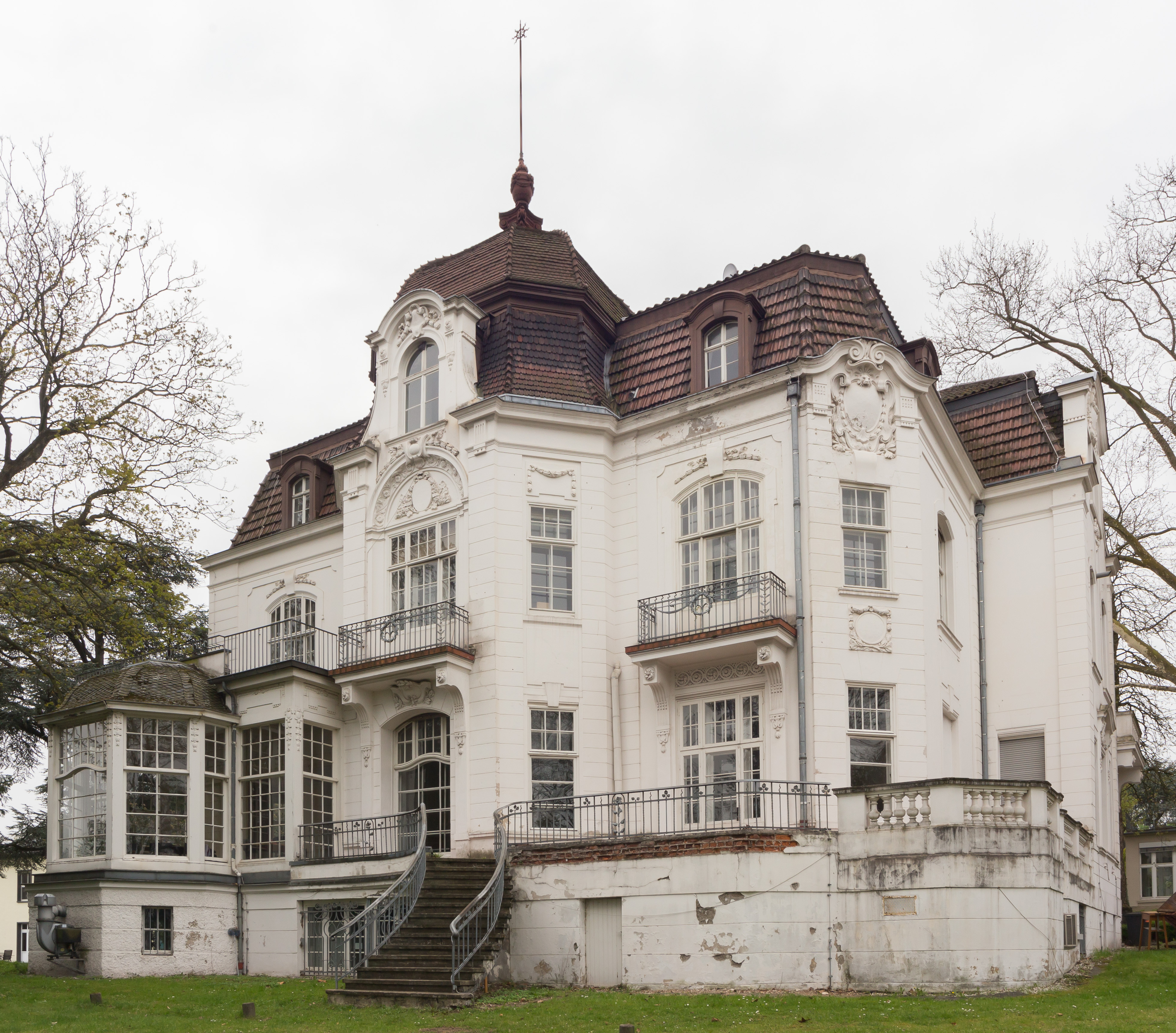 Villa Finkler (Teil der Universitäts-Kinderklinik), Tempelstraße 10, Bonn: Ansicht aus Norden, Rheinseite